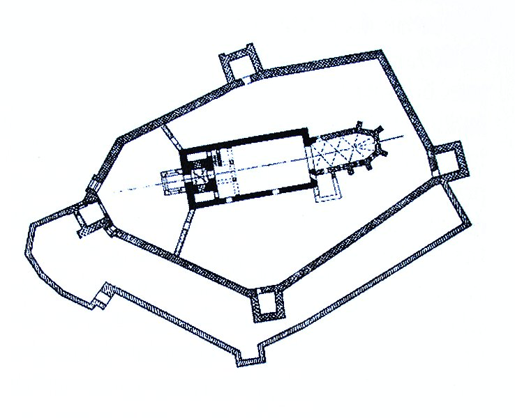 Planul fortificatiei din Cincsor, Brasov.